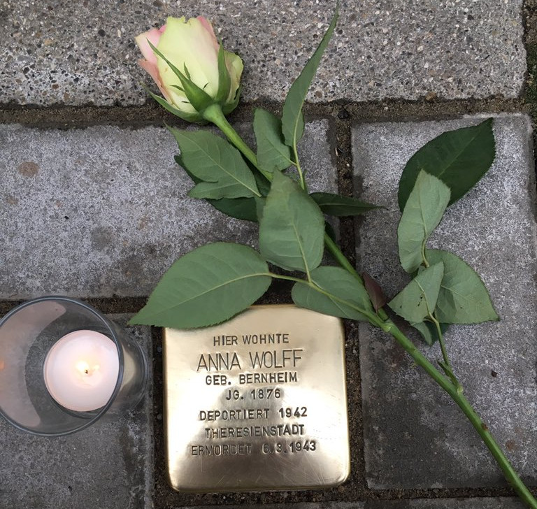 Stolperstein Neu-Ulm Anna Wolff